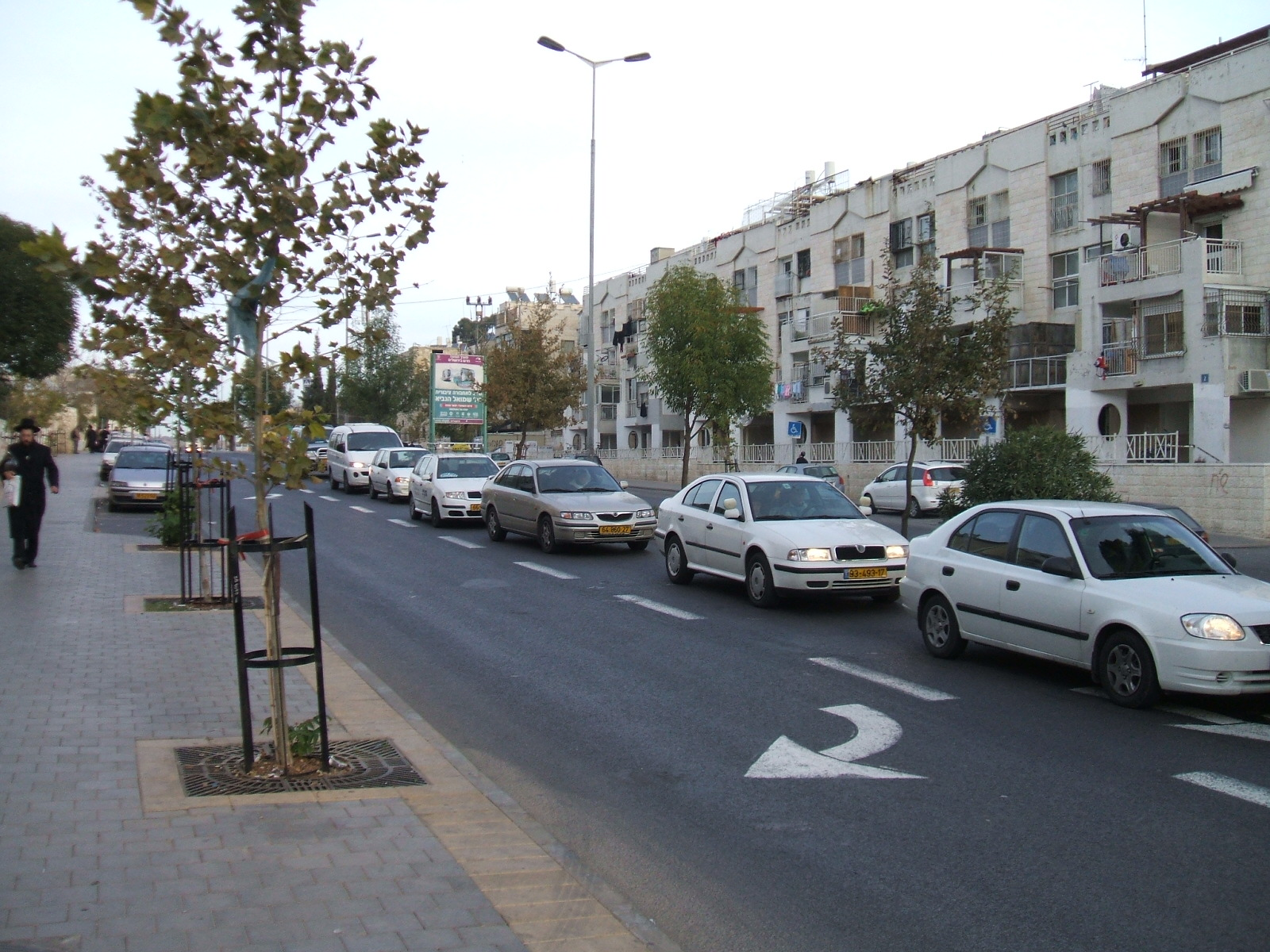 Shmuel Hanavi st. Jerusalem